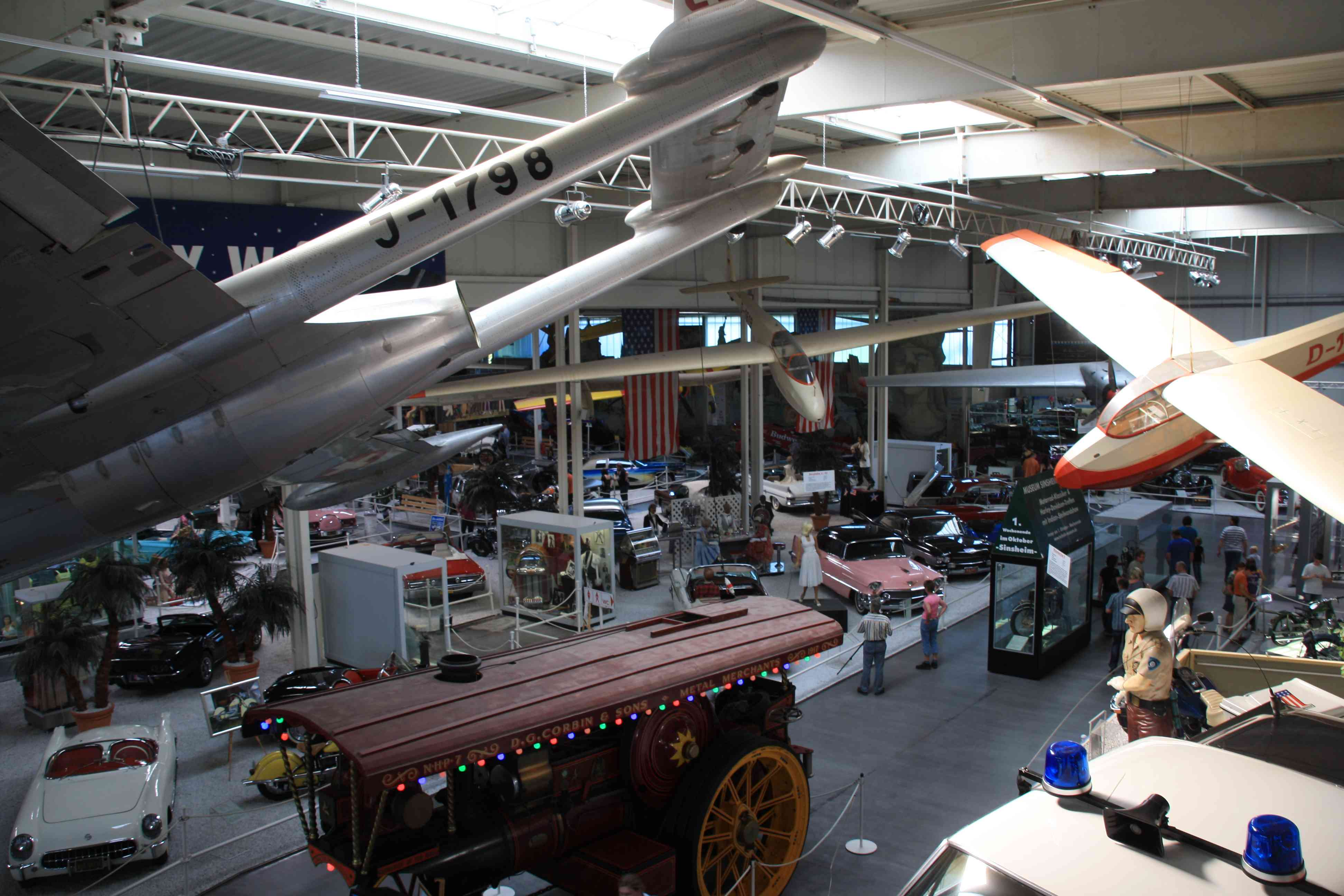 Blick in eine Ausstellungshalle des Technikmuseums in Sinsheim